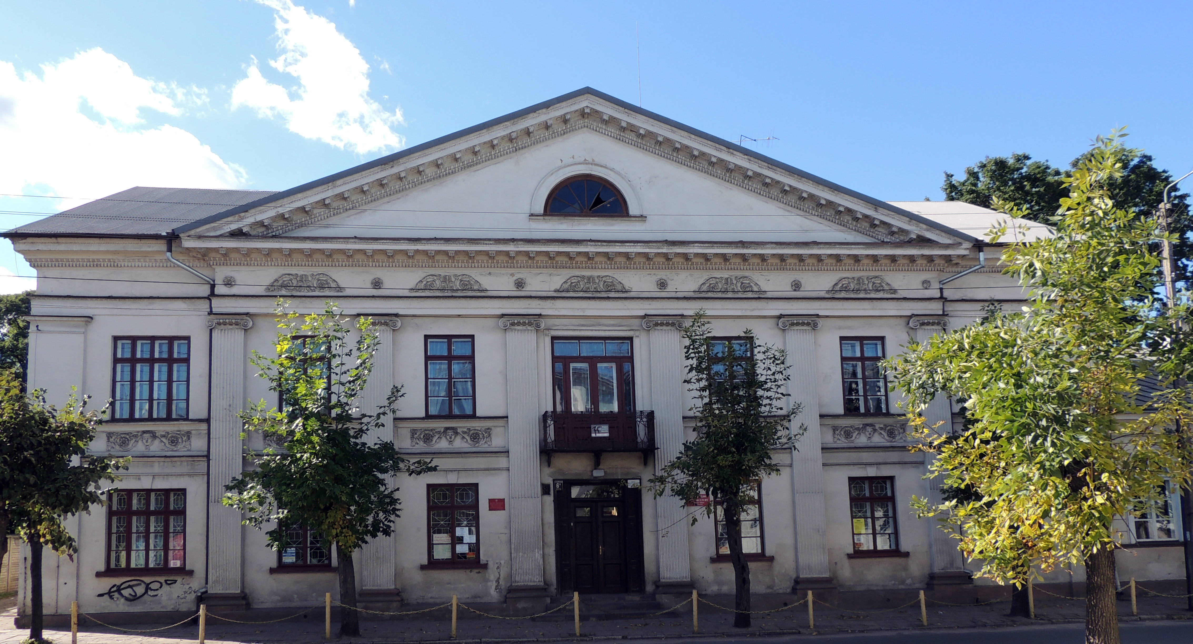 Ozorków, ul. Listopadowa 6 b - pałac Schlosserów, k. XIX (zabytek nr rejestr. A/500)